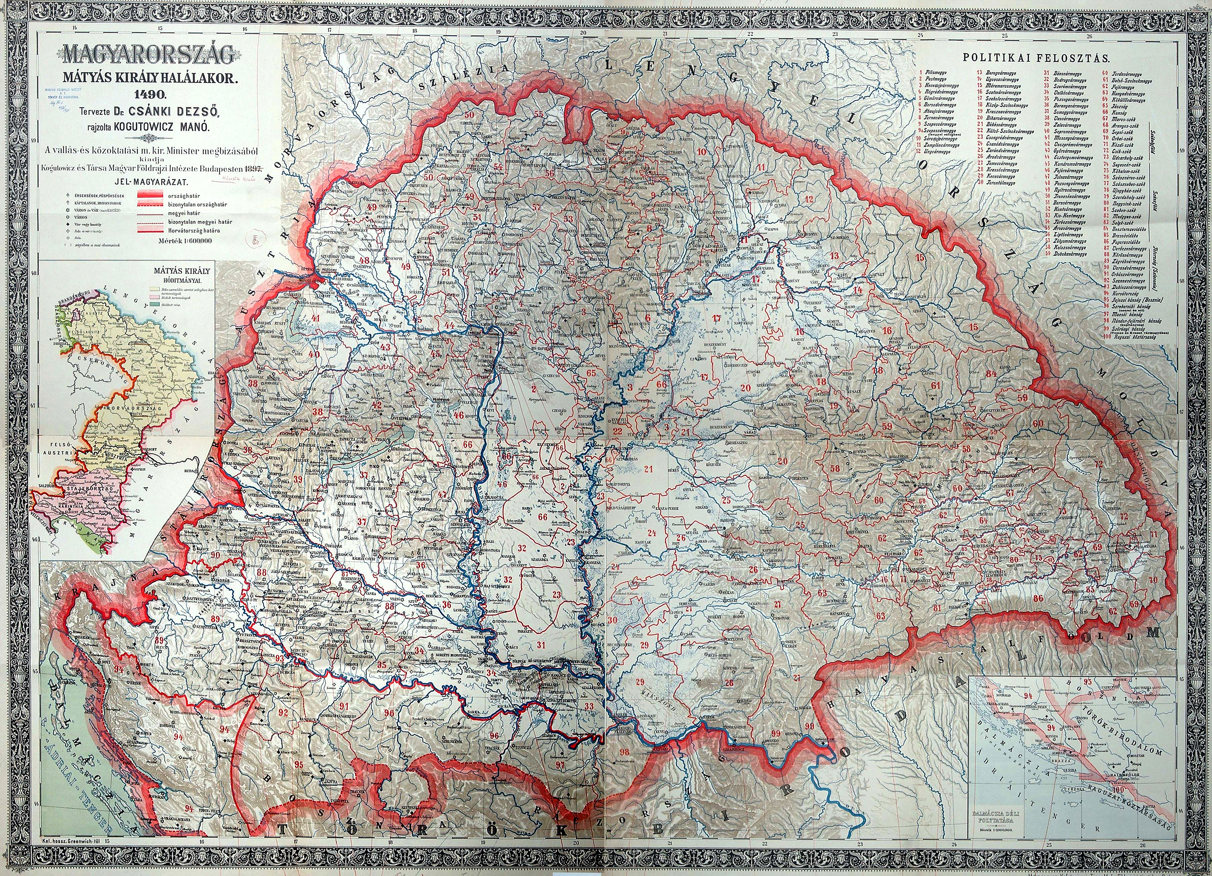 Magyarország térképe Mátyás király halálakor (1490) Tervezte: Dr. Csánki Dezső Rajzolta: Kogutowicz Manó Magyarország történelmi földrajza a Hunyadiak korában. A m. tud. akadémia megbizásából. I-V. kötet. Budapest. (Hunyadiak kora Magyarországon VI.)